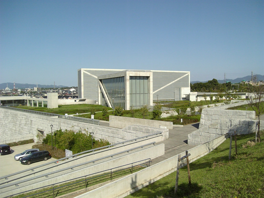 大阪府立狭山池博物館 外観